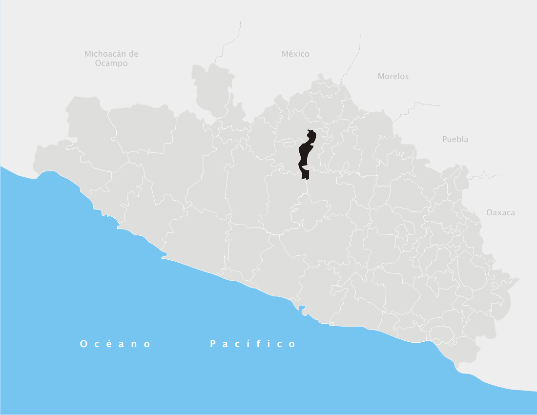 Cuetzala del Progreso en el estado de Guerrero (México)